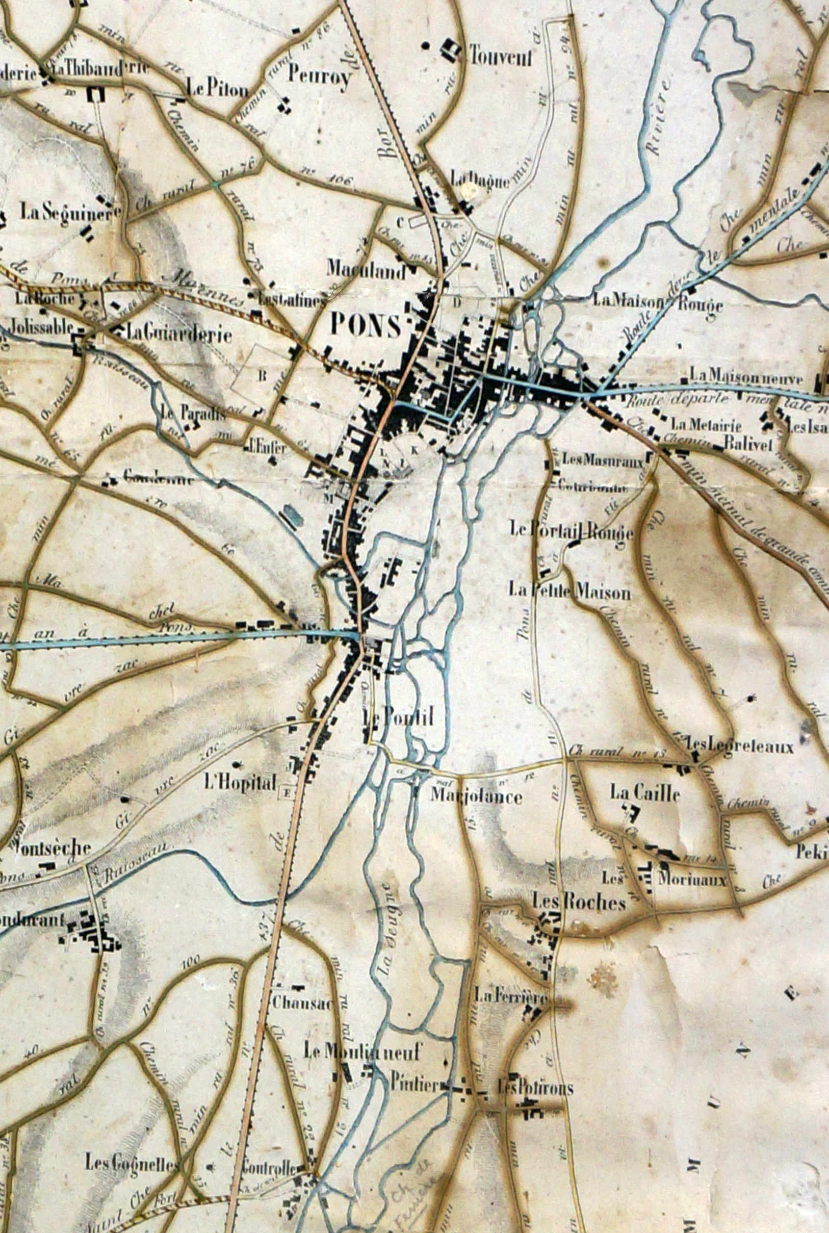 à Pons.